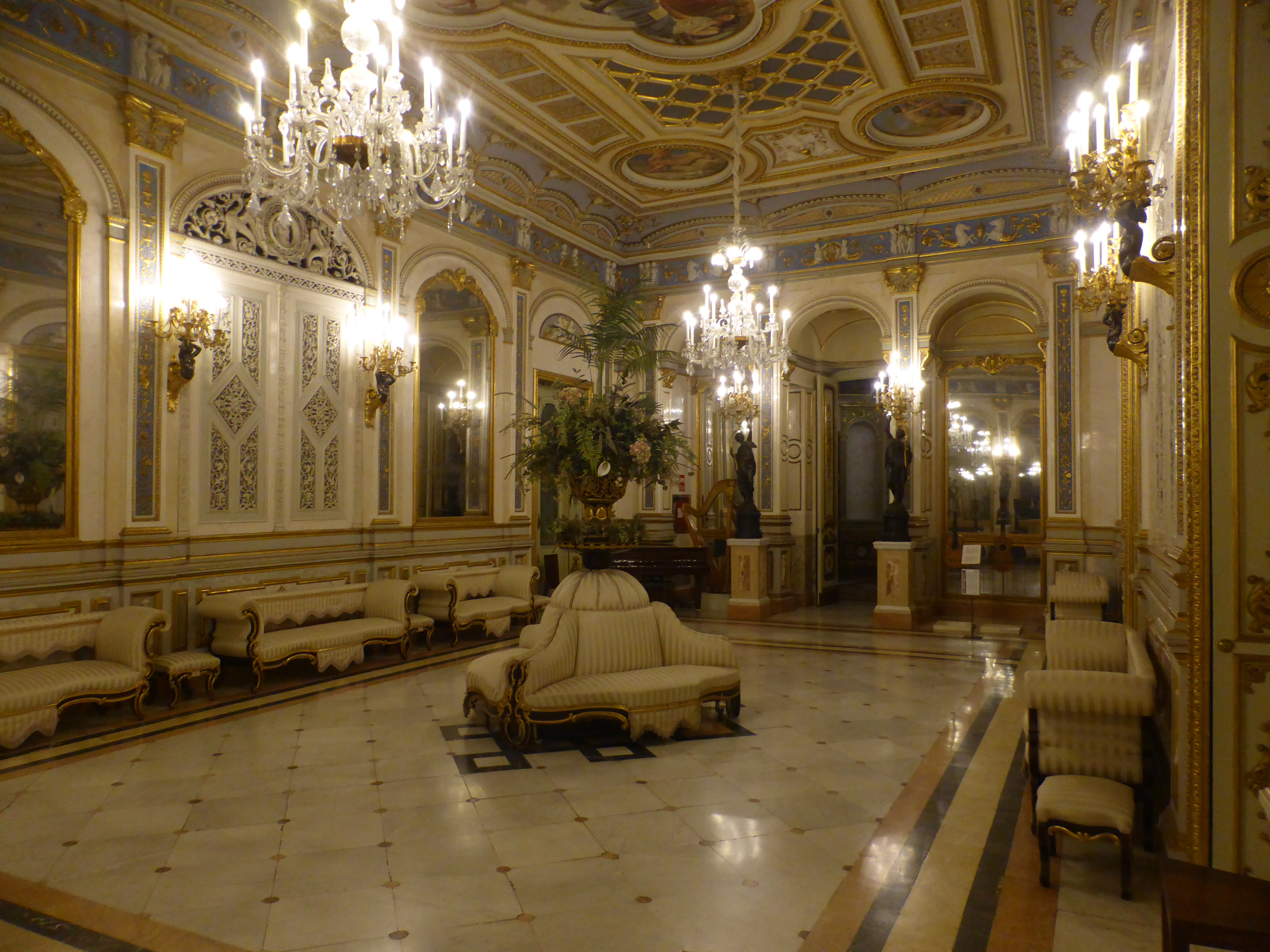 En la primera planta del "Museo Nacional de Cerámica y Artes Suntuarias González Martí", se encuentra el antiguo salón de baile del llamado Palacio del Marqués de Dos Aguas.